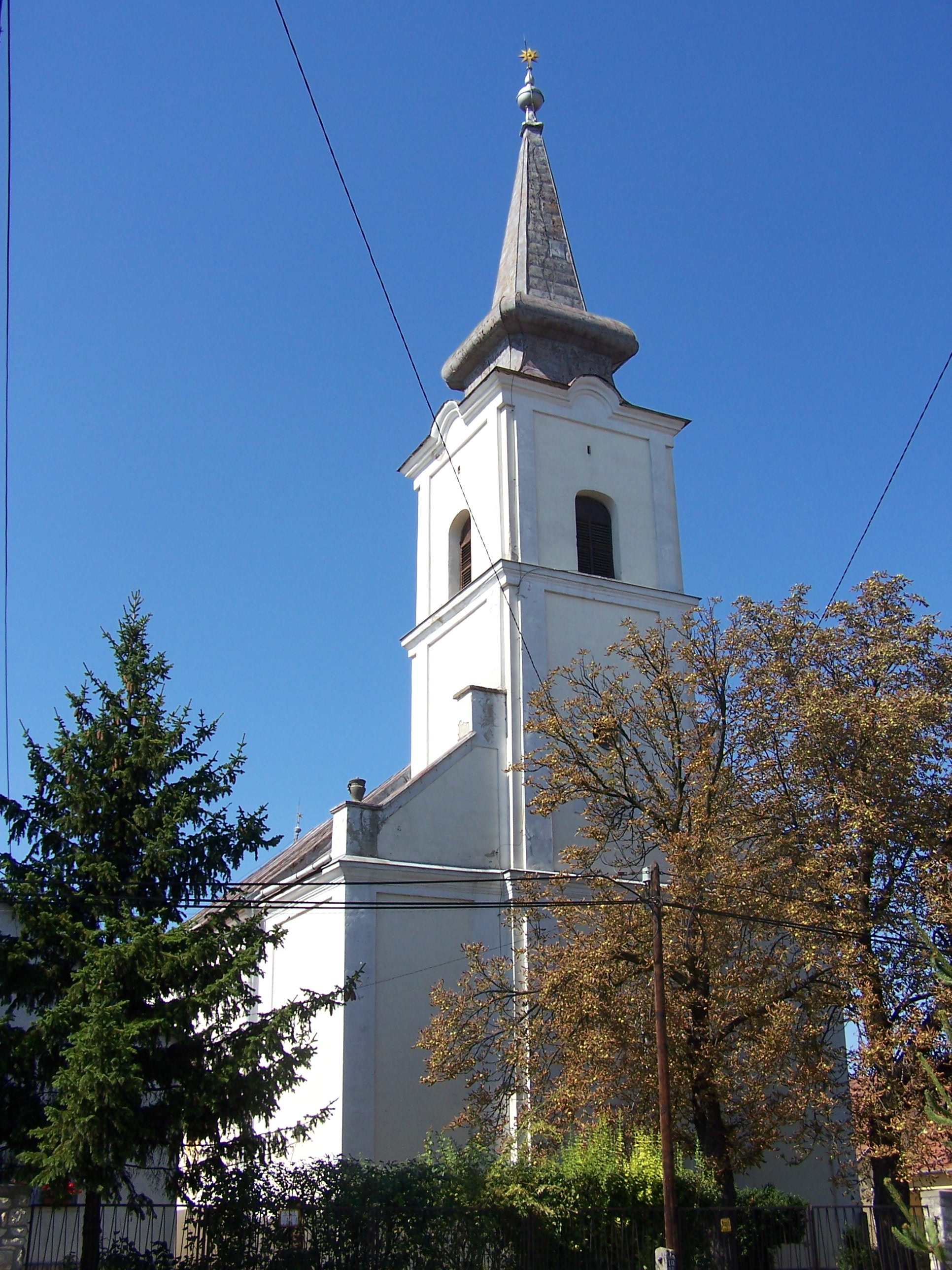 Evangélikus templom (Arnót, Petőfi Sándor utca 96a) This is a photo of a monument in Hungary, Identifier: 2654